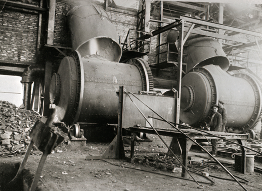 Konvertere i gammelhytta. Sulitjelma. 1927 NM.F.008010-00015